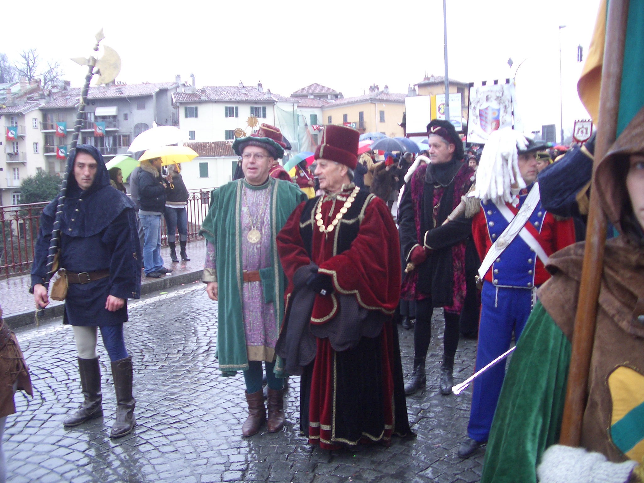 Carnival of Ivrea, Il Podestà durante la cerimonia della "Preda in Dora" ( The "Podestà" during the "Preda in Dora" ceremony)